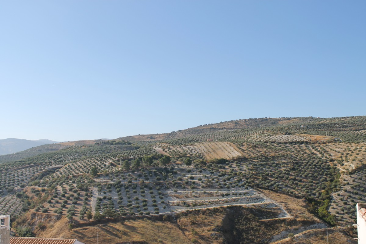 Baena